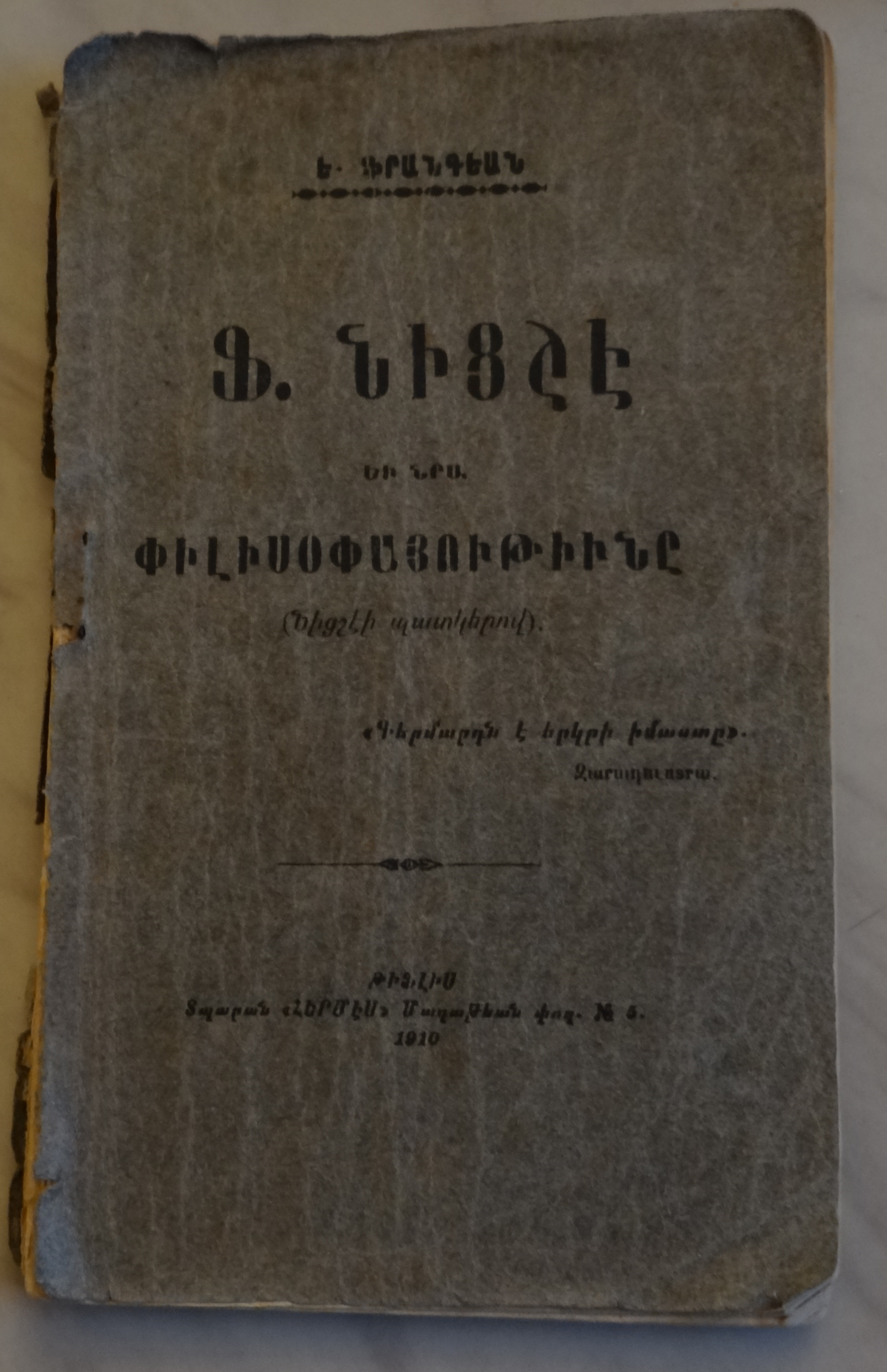 Նիցշեի մահից ɨ0 տարի անց, ɨœɨ0 թ. Թիֆլիսում հրատարակված Ե. Ֆրանգեանի «Ֆ. Նիցշէ եւ նրա փիլիսօփայութիւնը» գրքի կազմը